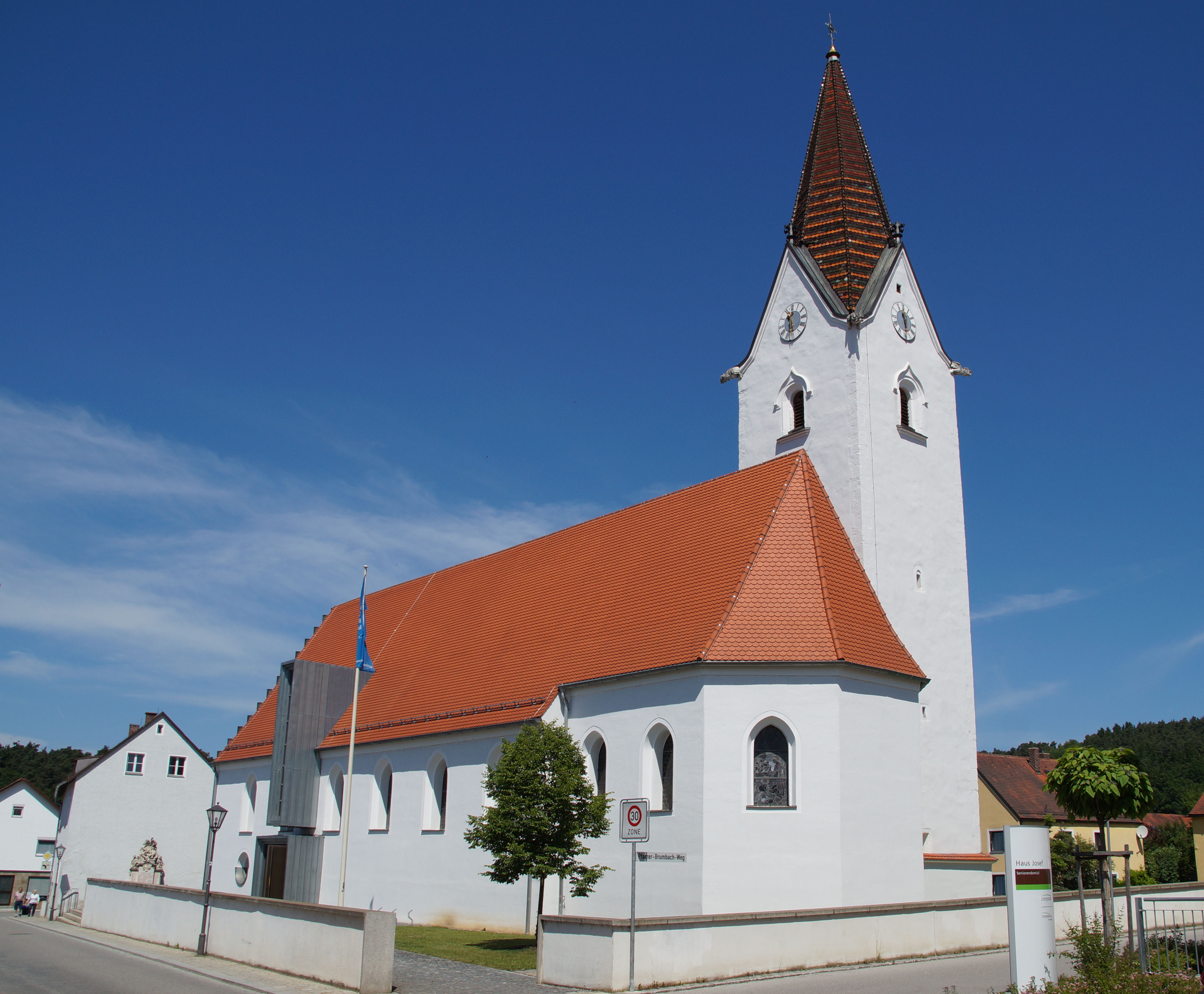 Polygonalchor und Flankenturm der kath. Pfarrkirche St. Peter, spätgotisch, 1477 (dendro. dat.), neugotisch überformt; mit Resten der historischen Ausstattung.